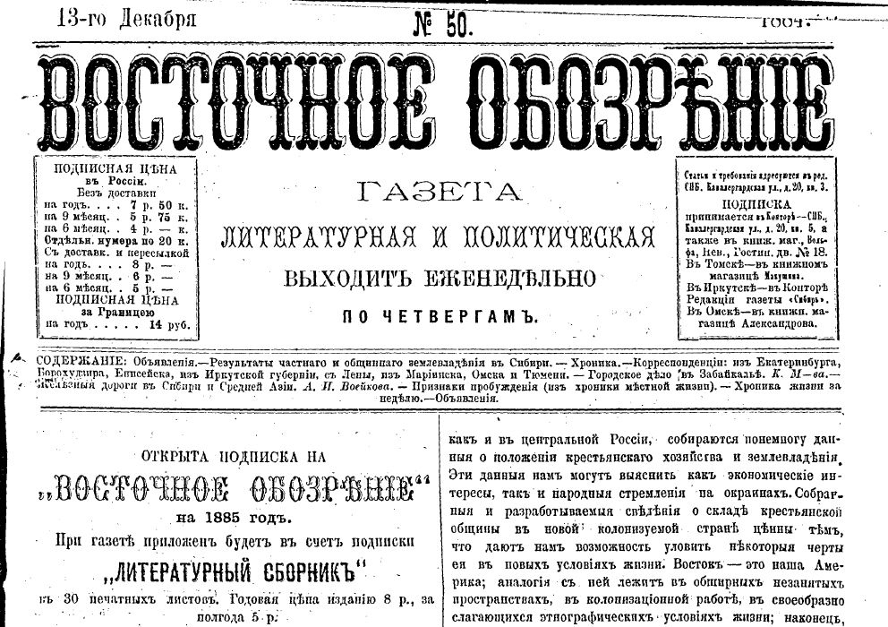 Газета "Восточное обозрение". Издавалась в Иркутске.